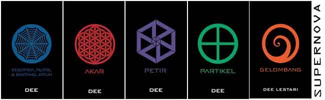 Cover Supernova 1-5